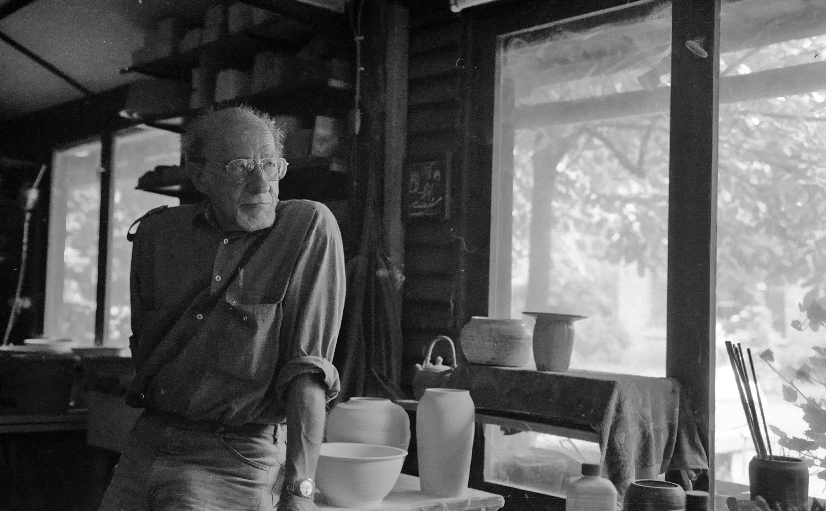 Guido Haazen